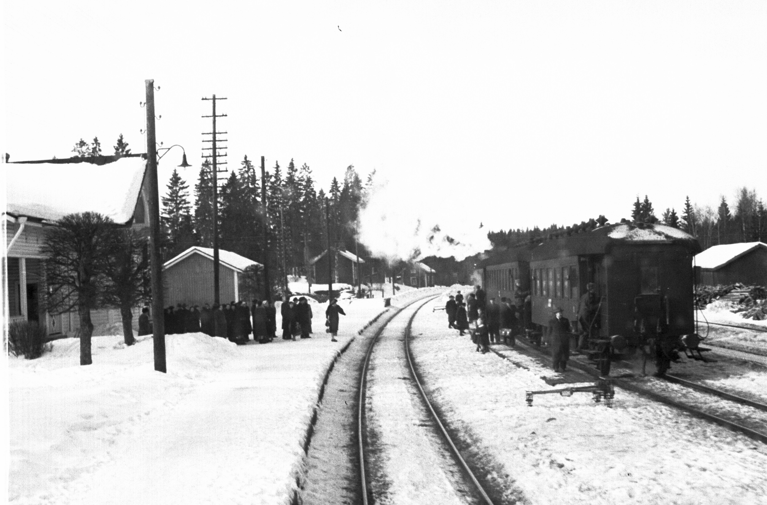 Kangasalan rautatieasema keväällä 1957 ja runsaasti matkustajia odottamassa junaa.